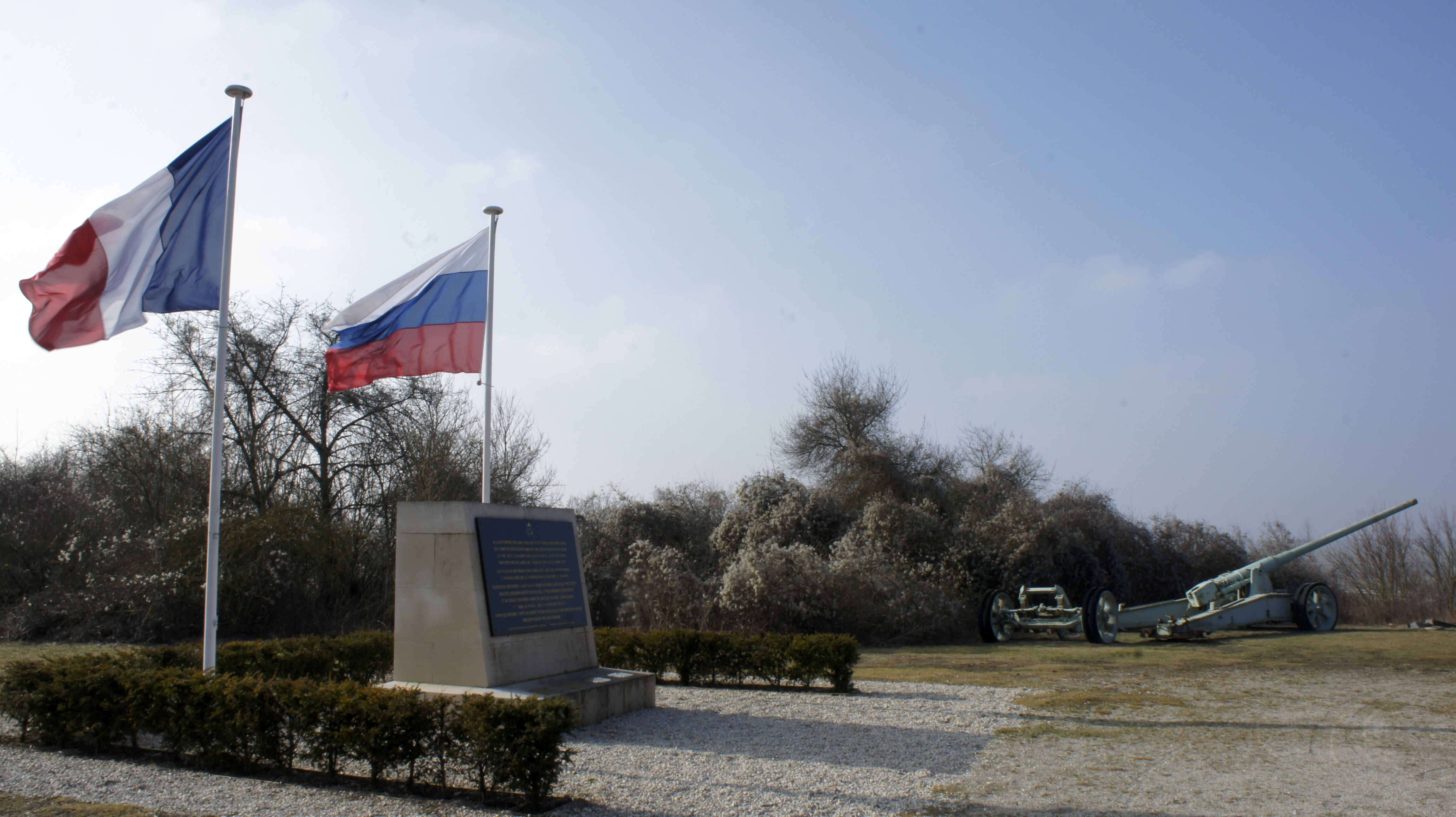 Monument troupes russes première et troisième brigade spéciale, collection du fort de la Pompelle .